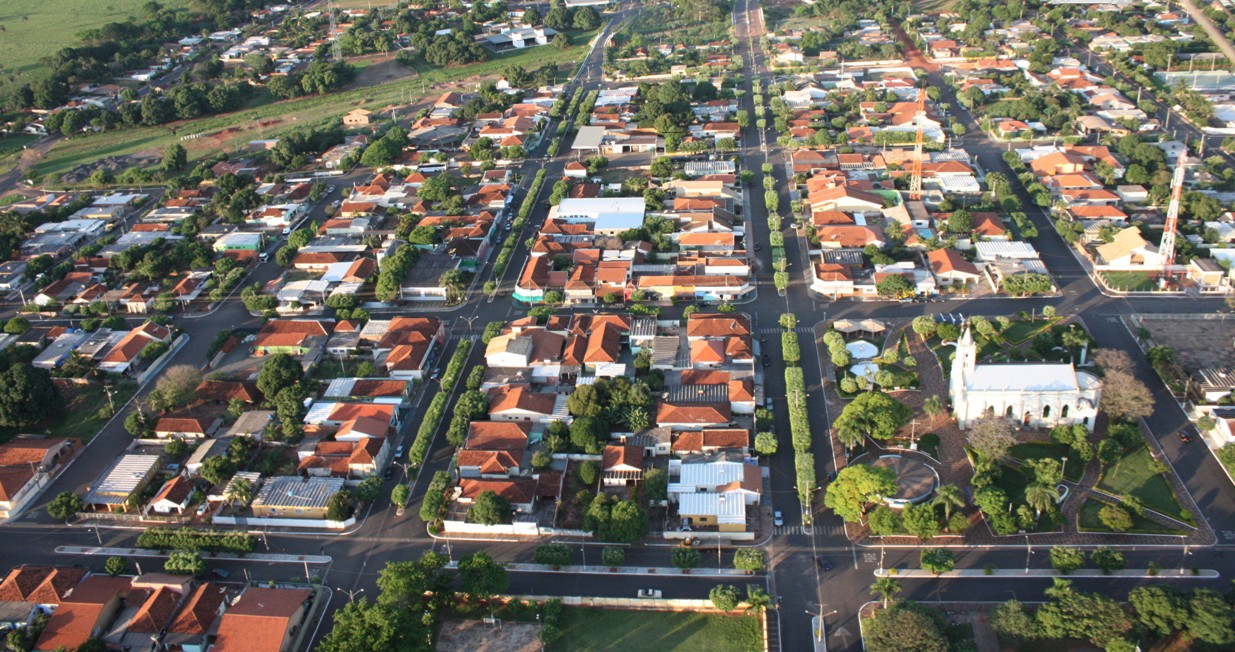 Cidade de Três Fronteiras